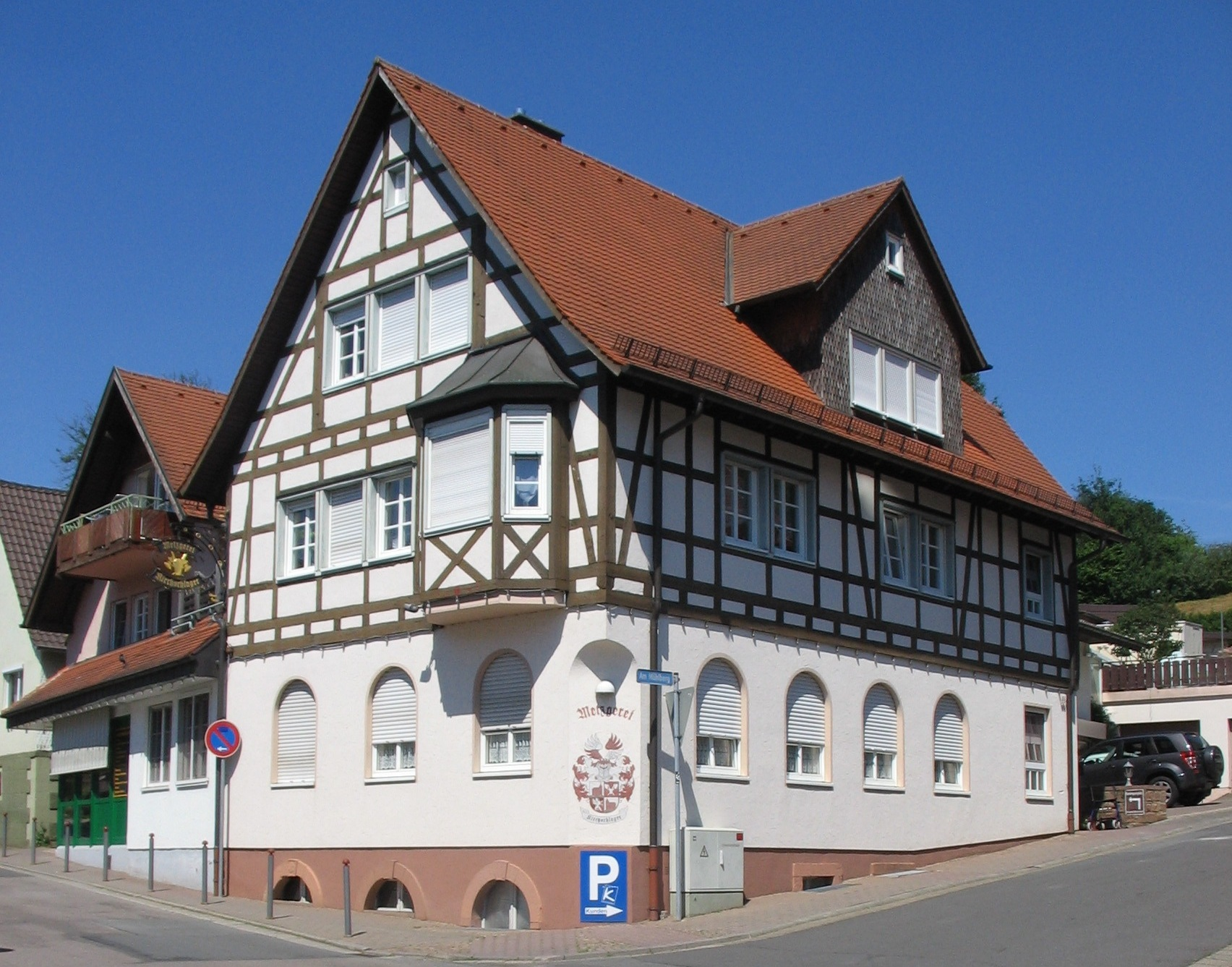 Fachwerkhaus mit Metzgerei in der Mitte von Dorf-Erbach